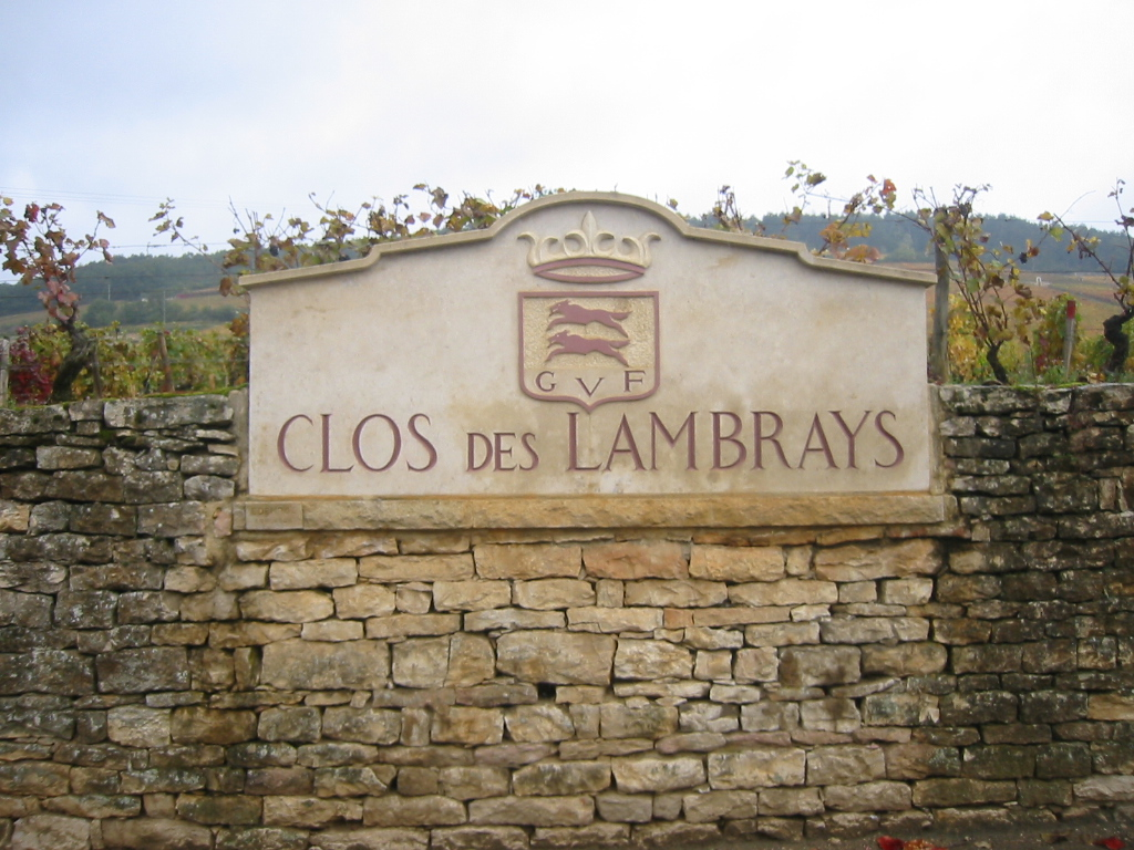 Clos de Lambrays 2 - Grand crus de Bourgogne à Morey Saint Denis